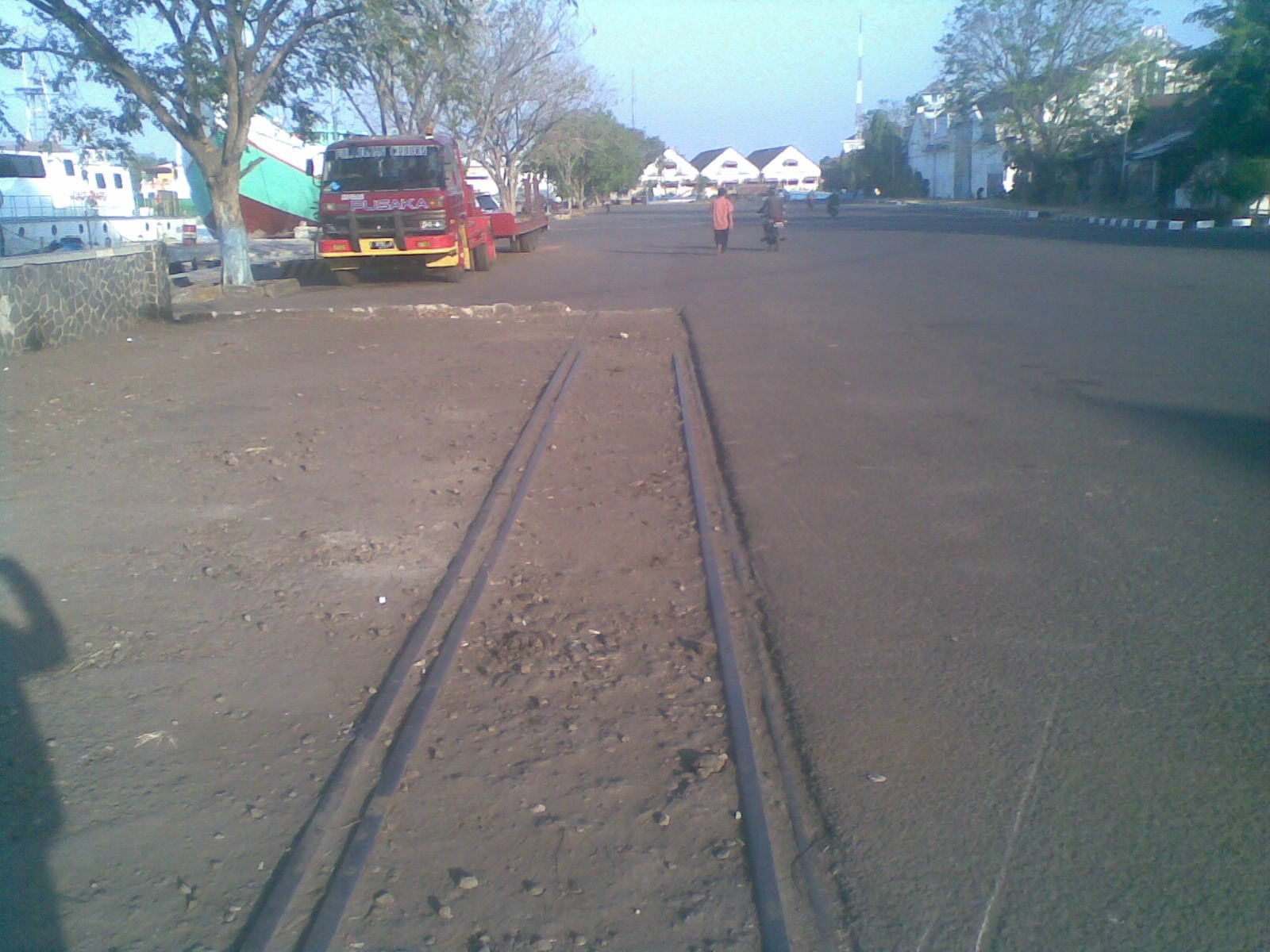 bekas rel kereta api di area pelabuhan cirebon 2012